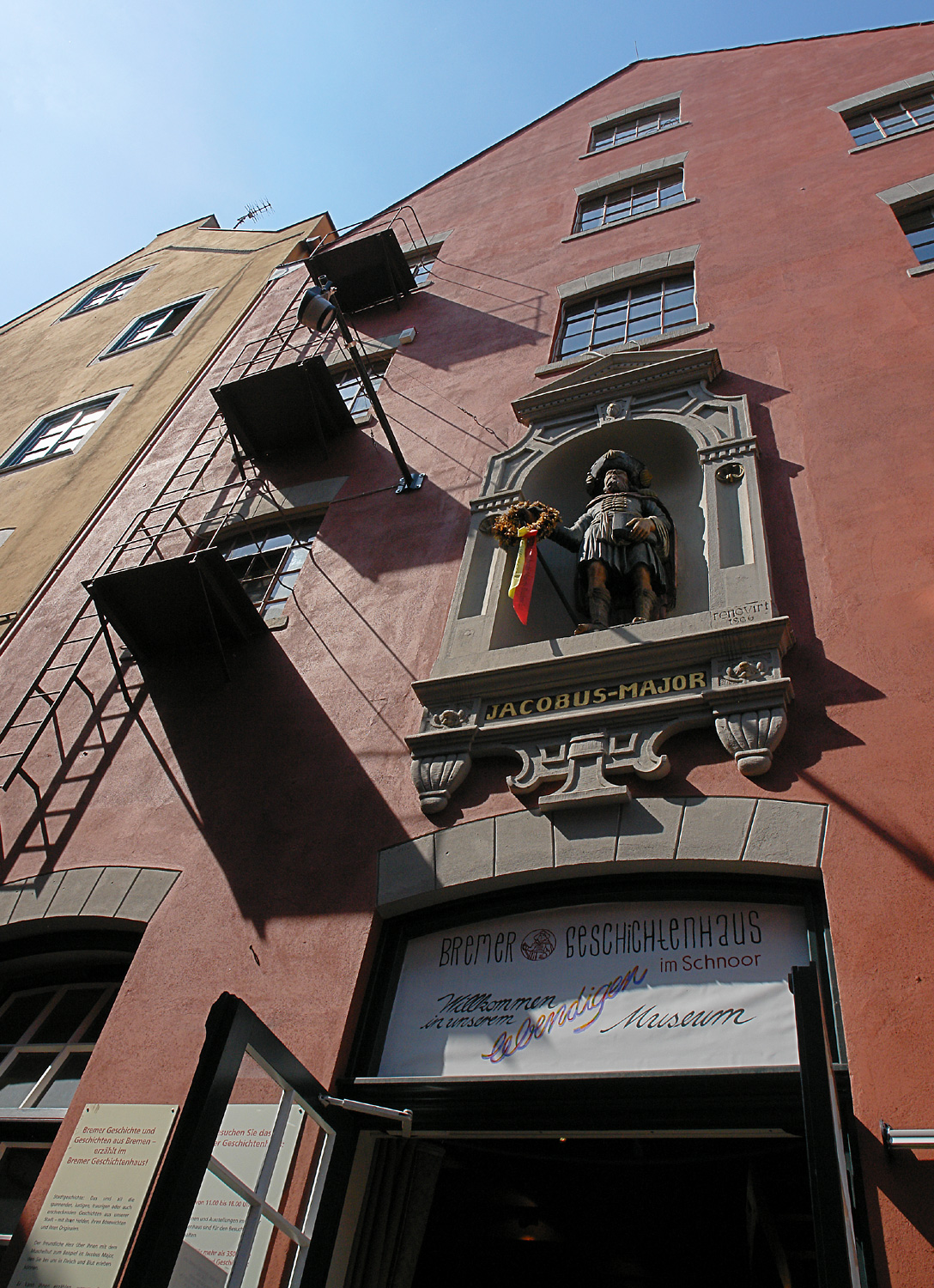 Sankt Jakobus Packhaus (Geschichtenhaus) im Schnoor, Wüstestätte 10 (Bremen) Das abgebildete Objekt ist ein geschütztes Kulturdenkmal in der Freien Hansestadt Bremen, mit der Nr. 1341,T beim Landesamt für Denkmalpflege registriert.